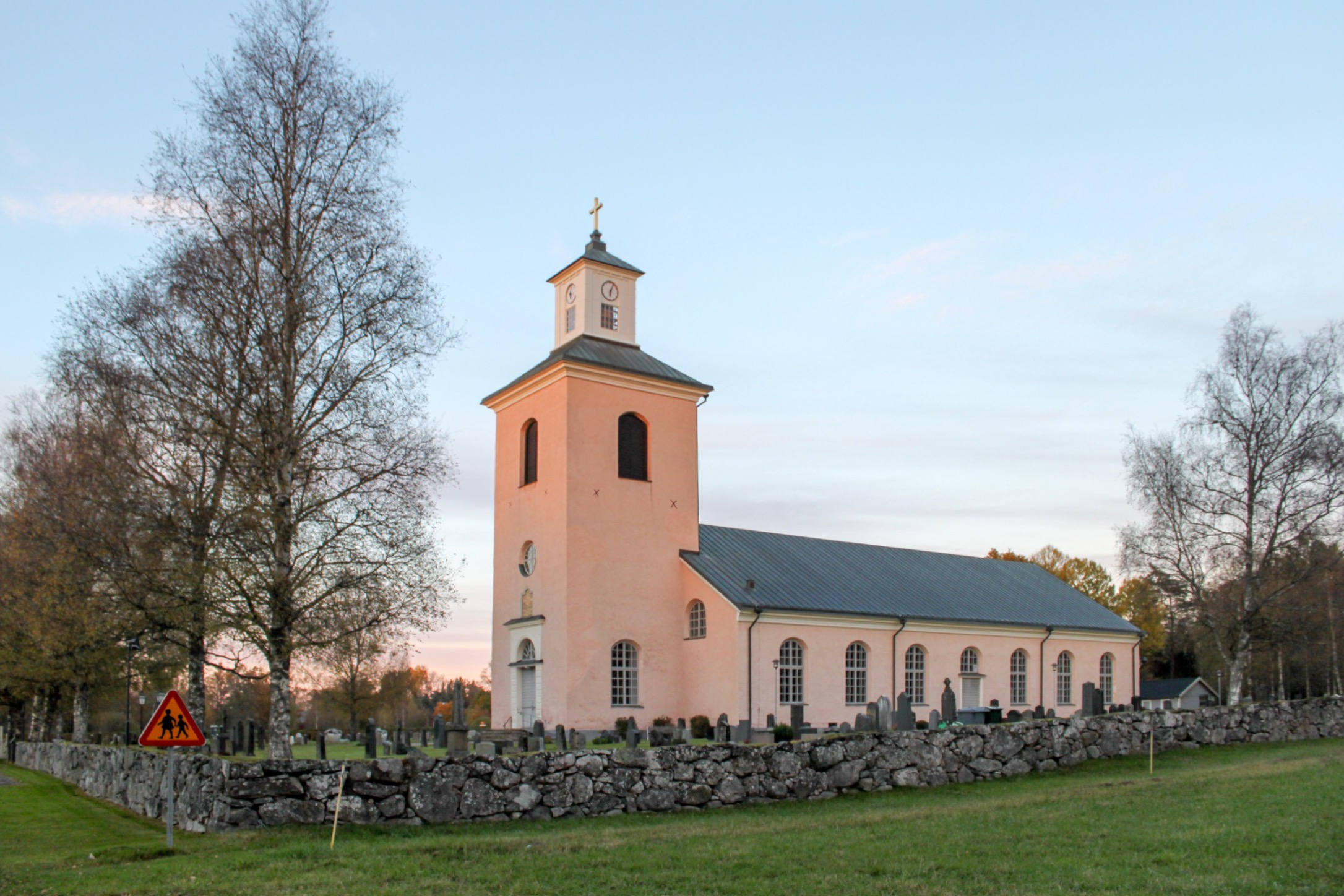 Pjätteryds kyrka